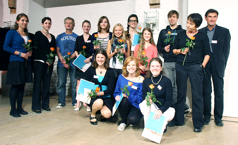 Foto bei der Preisverleihung des Landshuter Jugendbuchpreises Auserlesen 2010 mit Mirjam Pressler, Heiner Lange und Jaromir Konecny